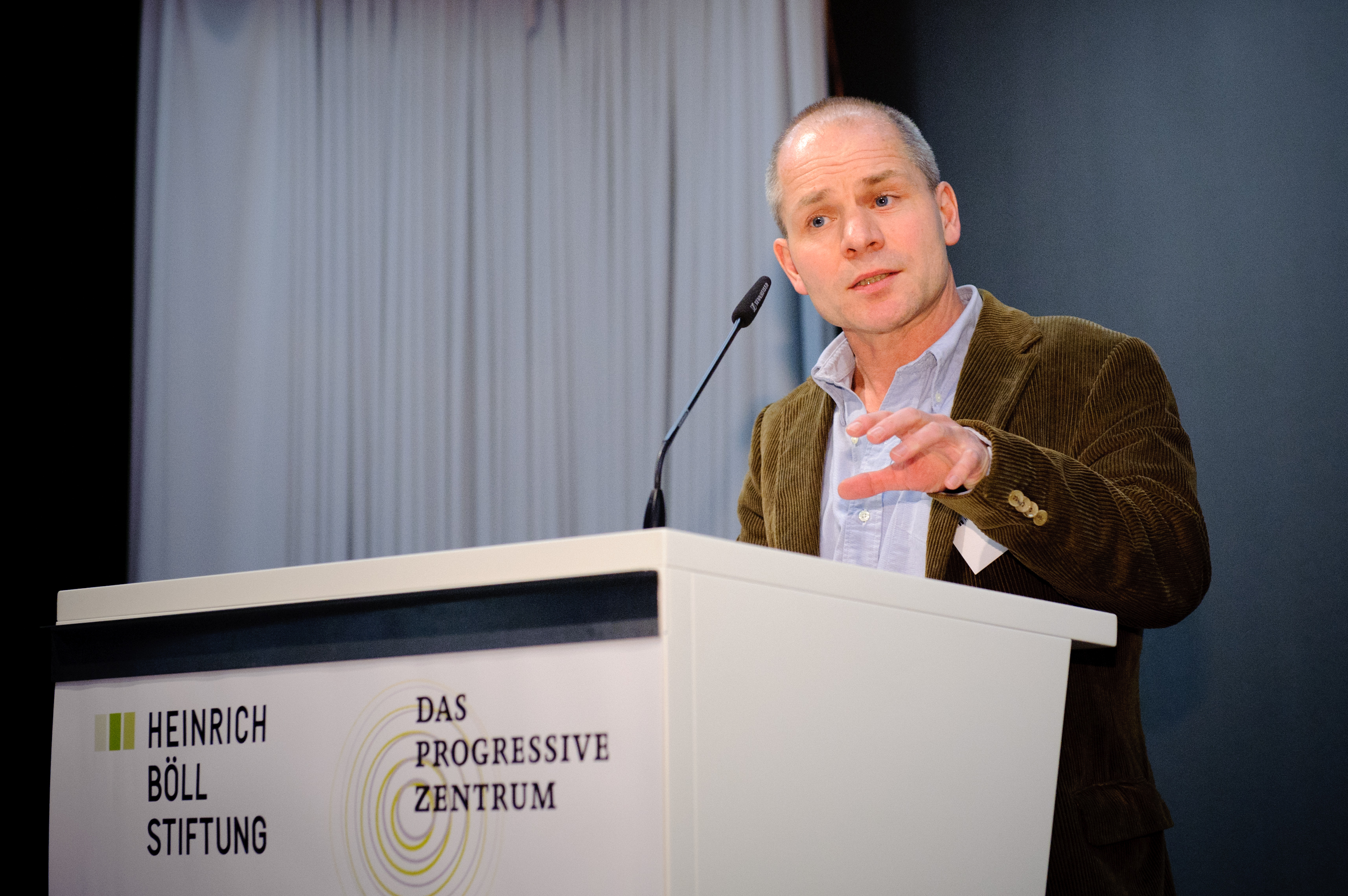 Dr. Tobias Dürr, Vorstitzender des Progressiven Zentrums; Foto: Stephan Roehl